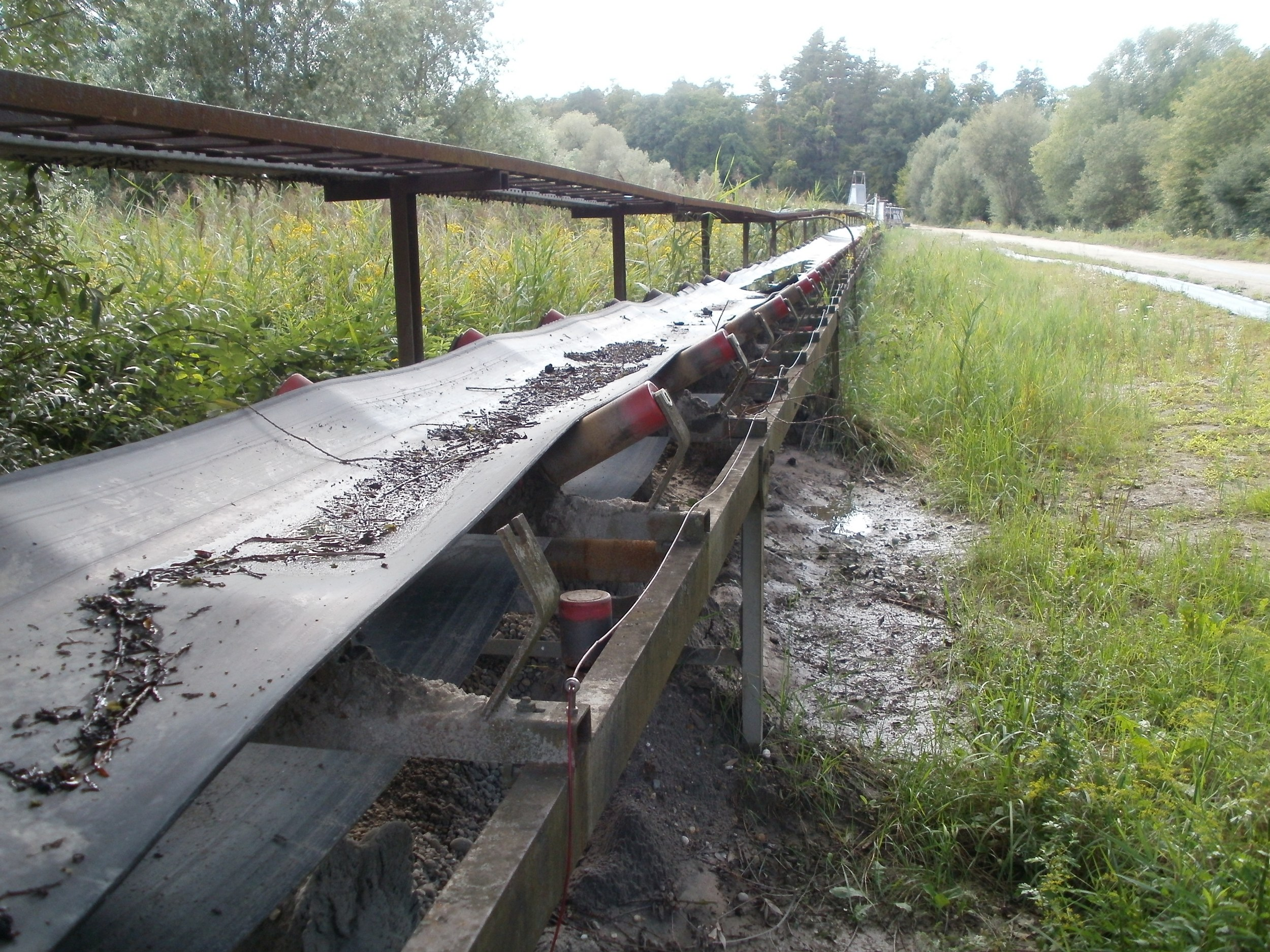 Kieswerk Kronau